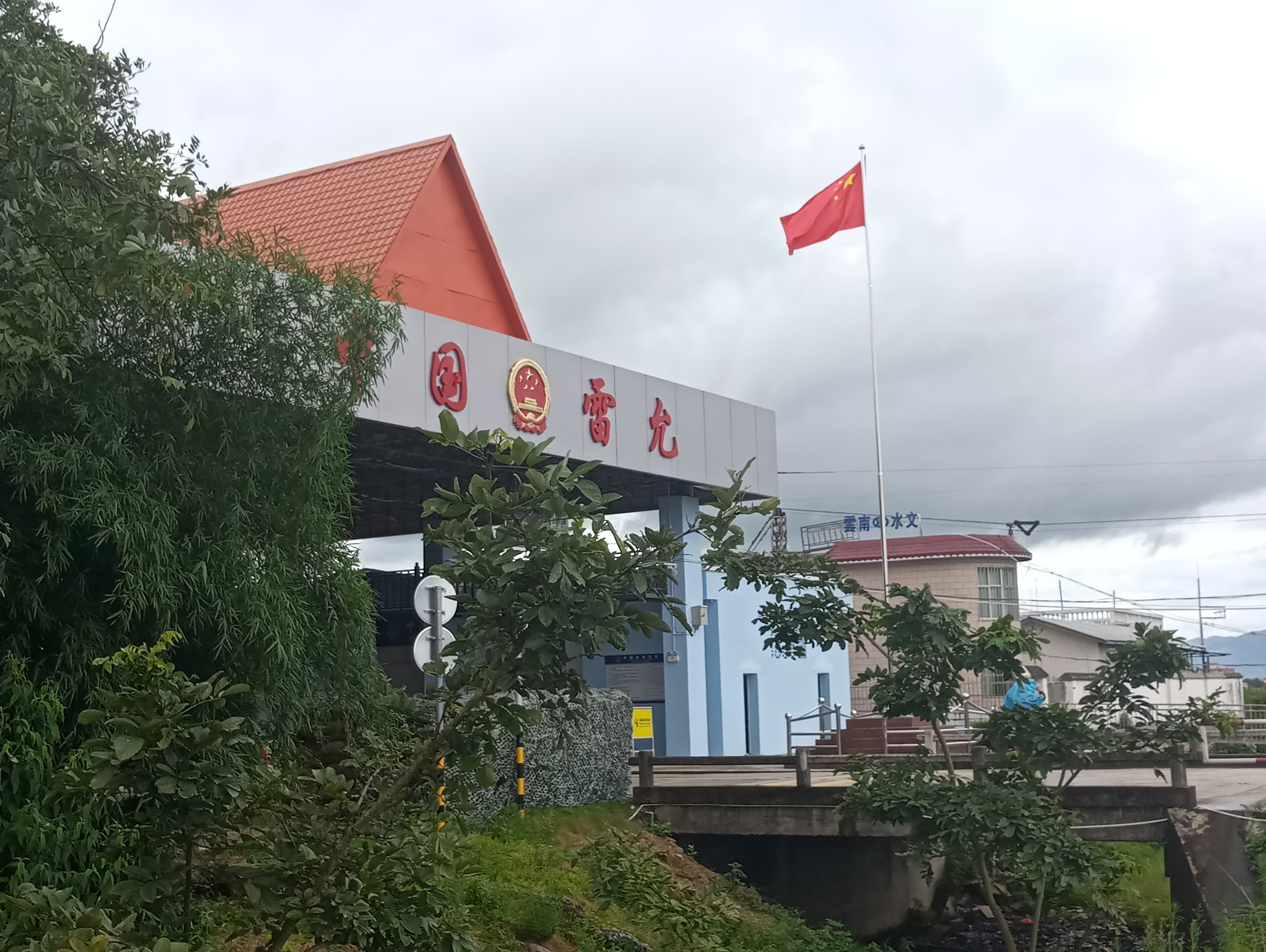 瑞丽市中缅边界雷允通道